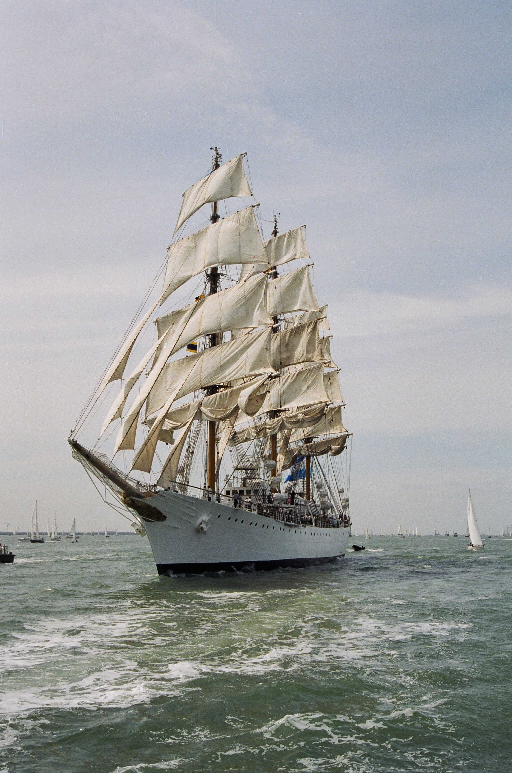 Fragata ARA Libertad